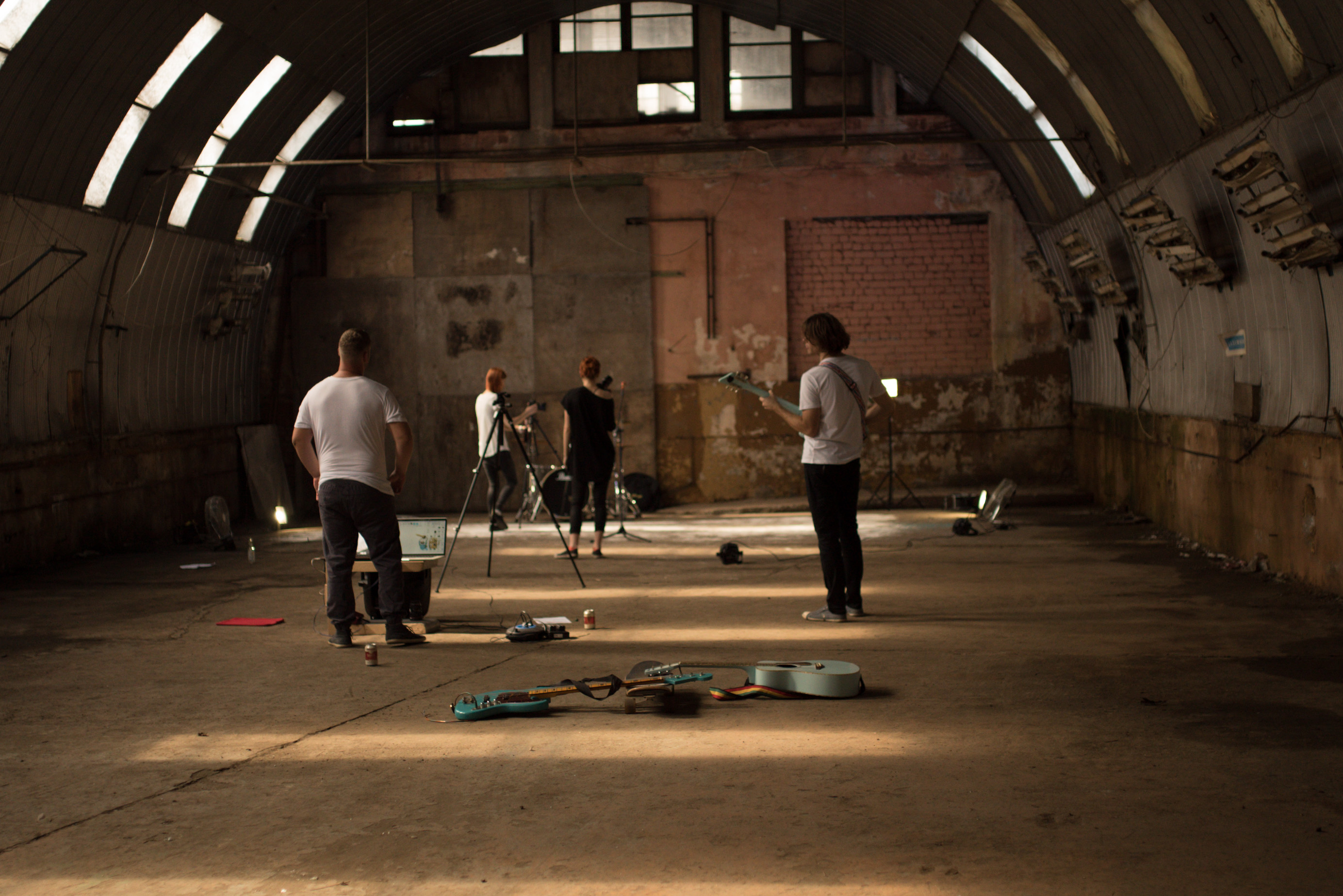 Ansambel Jelly Rue muusikavideo Gravity võtted